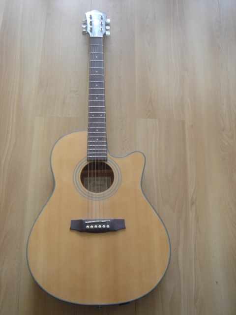 Ibanez AE5LG